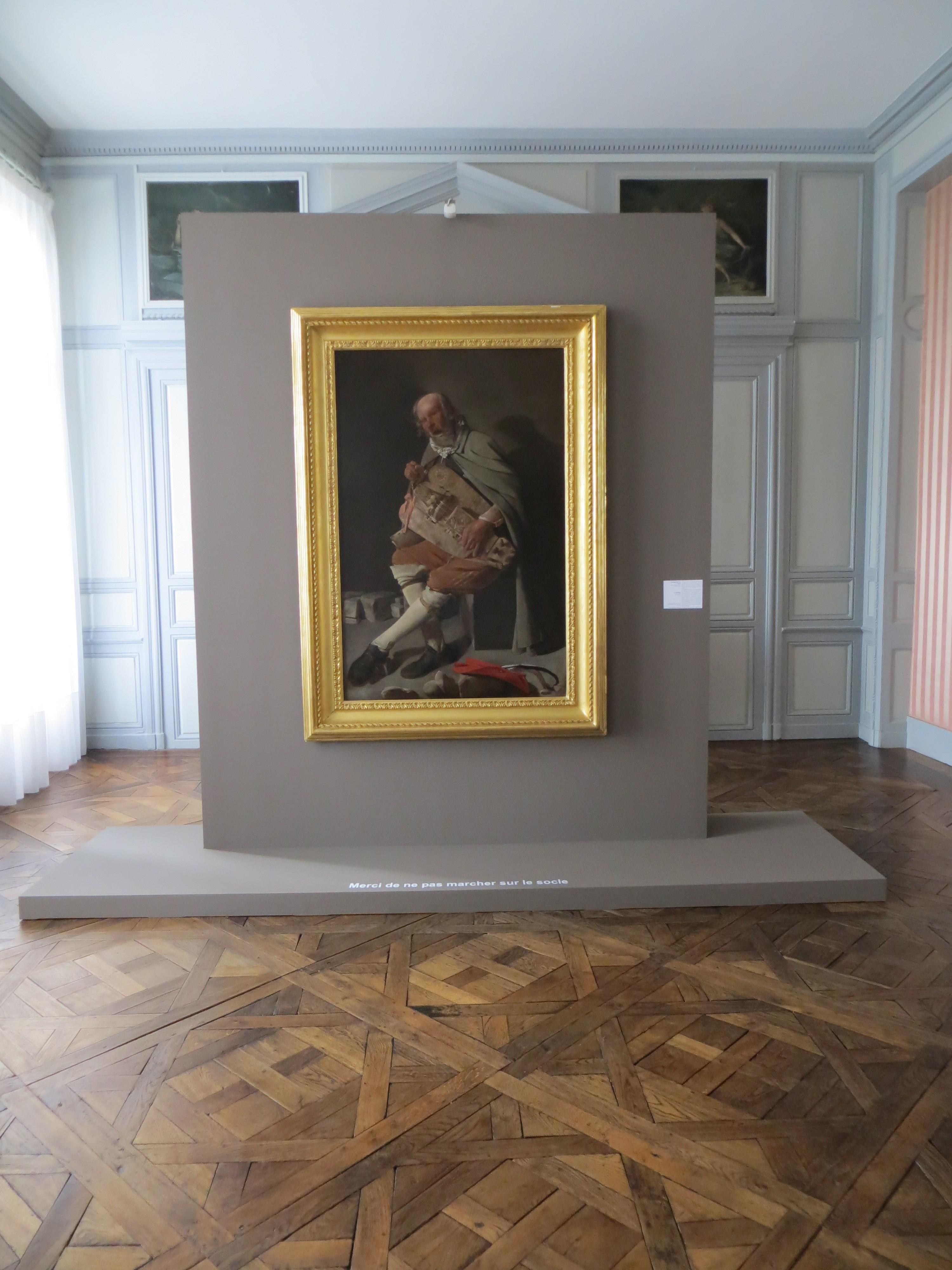 Georges de La Tour Le Vielleur à l'Hôtel Montaudouin dans le cadre du Le Voyage à Nantes août 2013